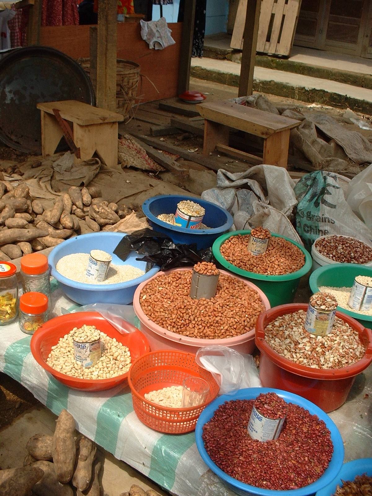 legumes secs au marché de bonamoussadi